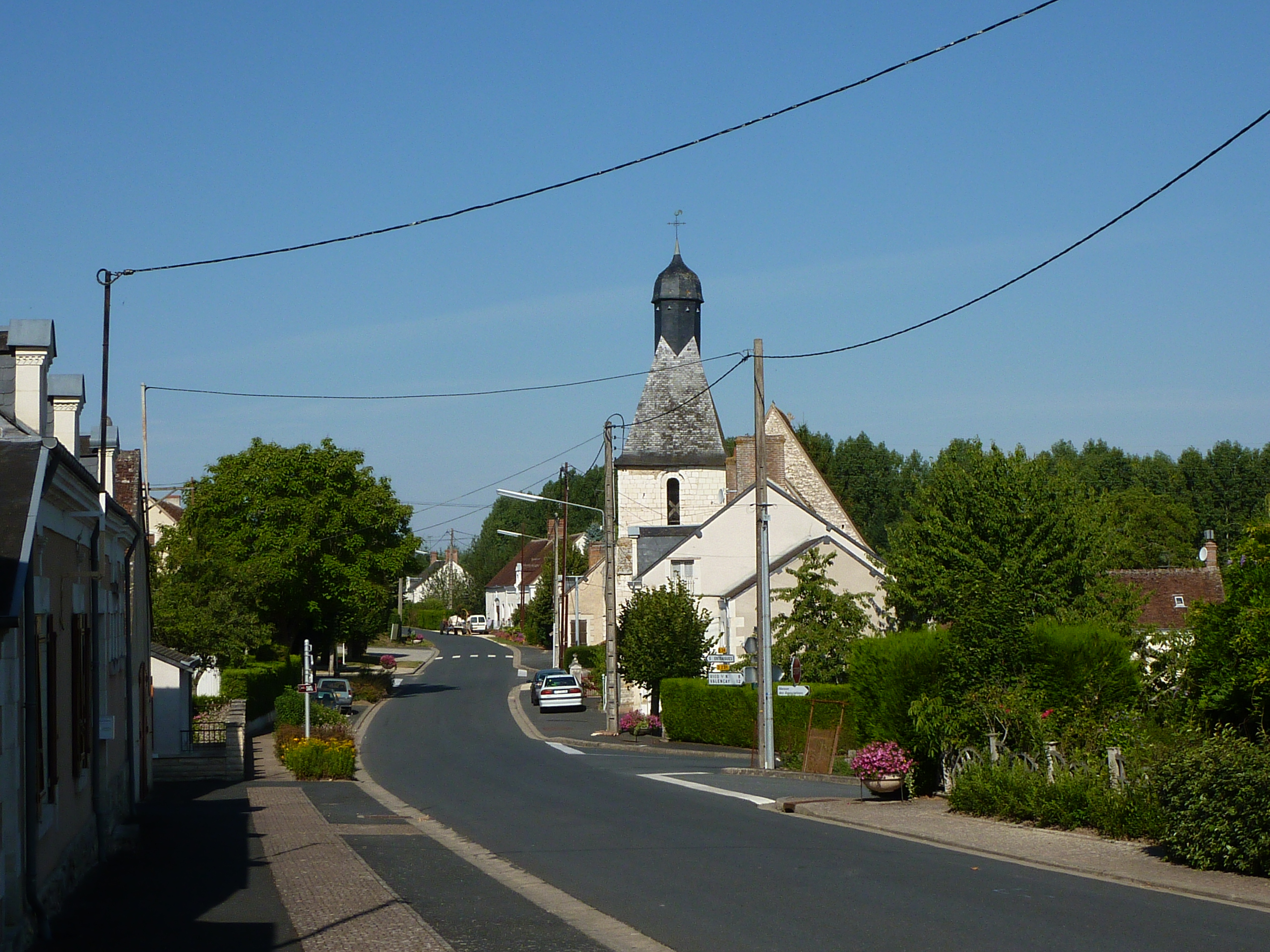 Vue de l'église depuis le centre du village de Baudres.